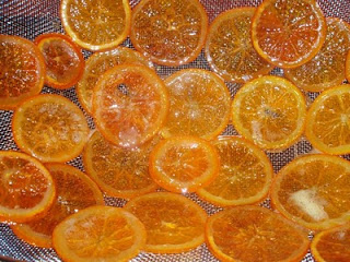 Dulce Guatemalteco